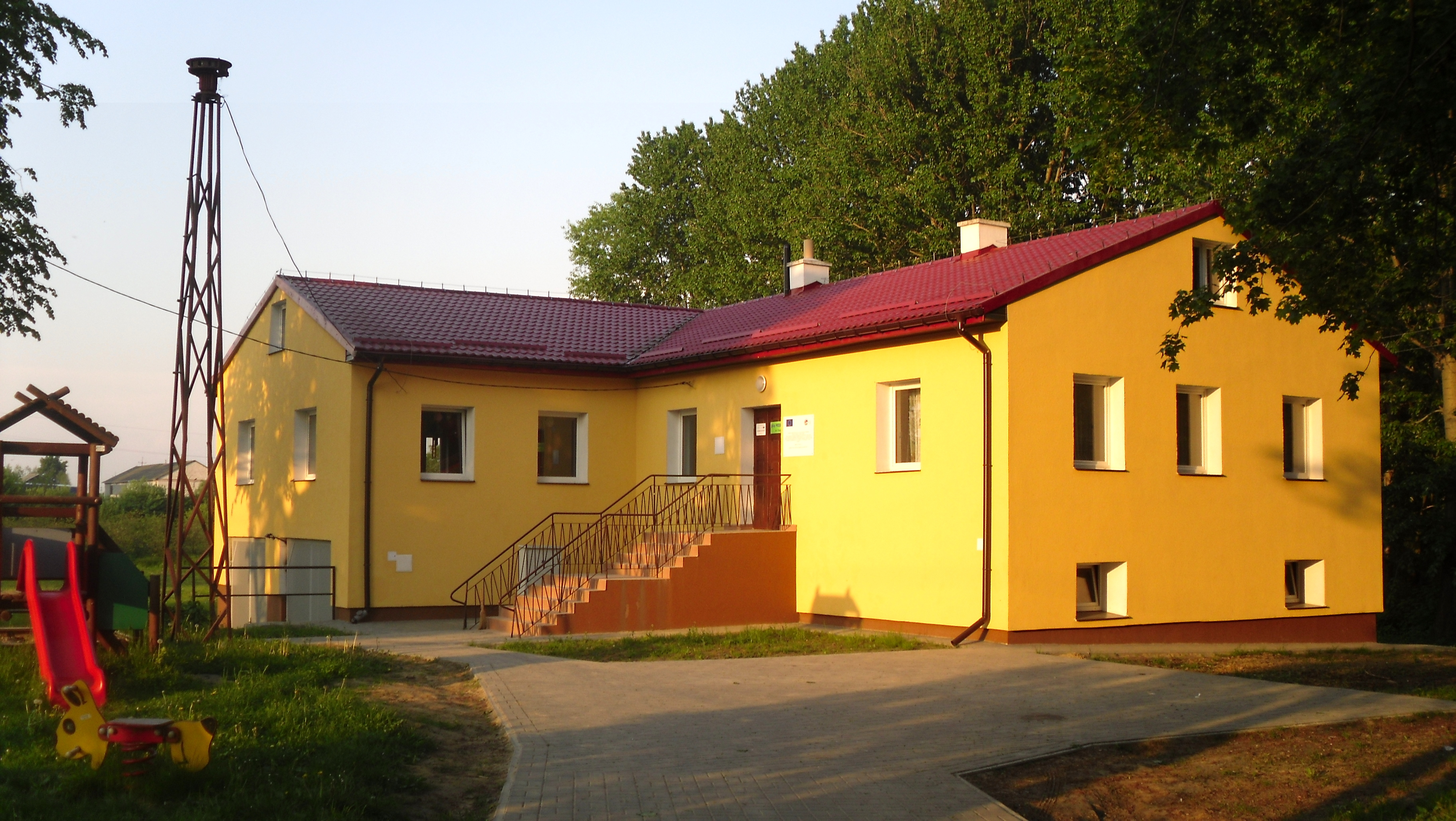 Budynek Centrum Społeczno- Kulturalnego w Ługowie.